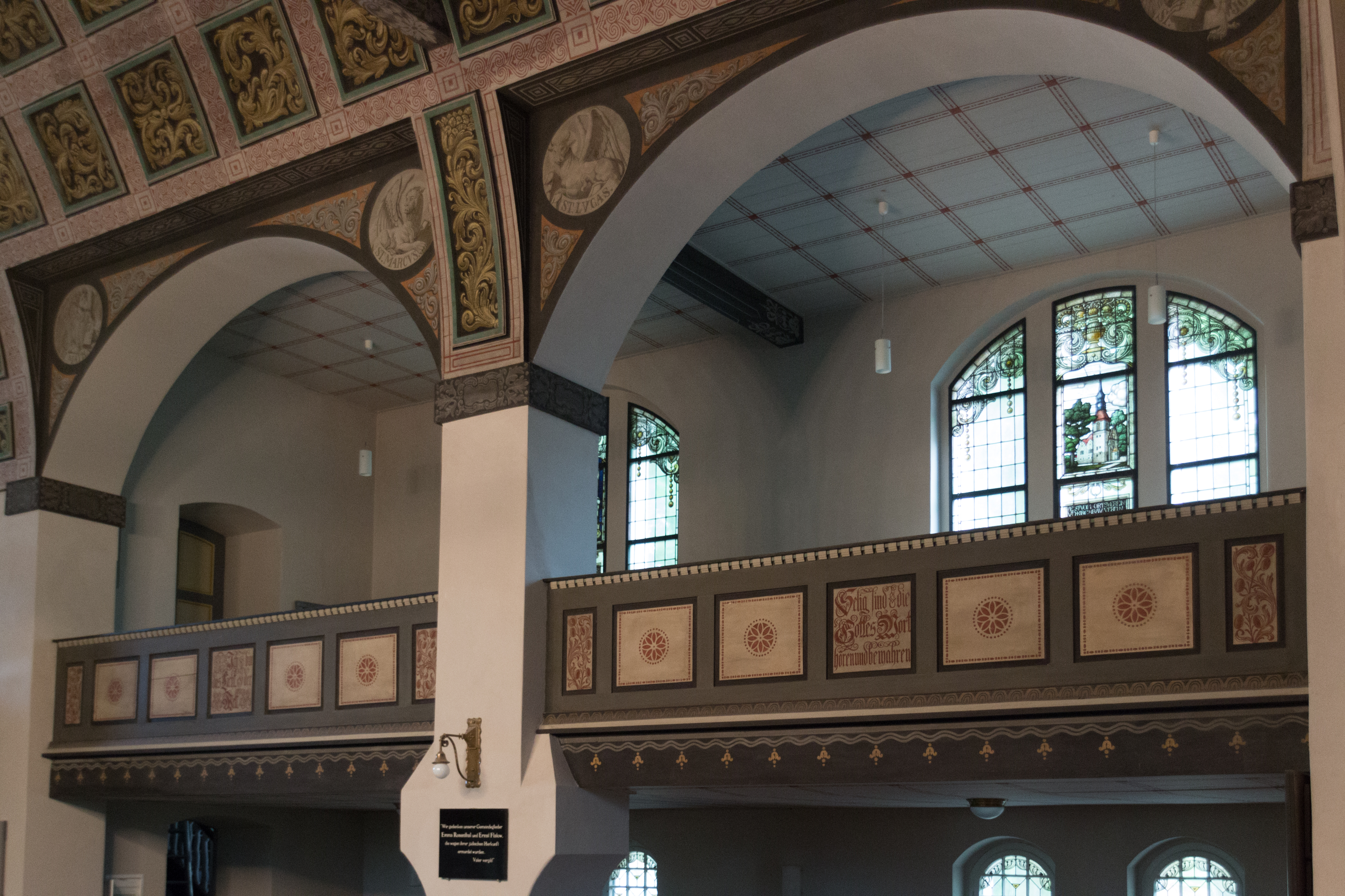 Dorfkirche Hohen Neuendorf Empore